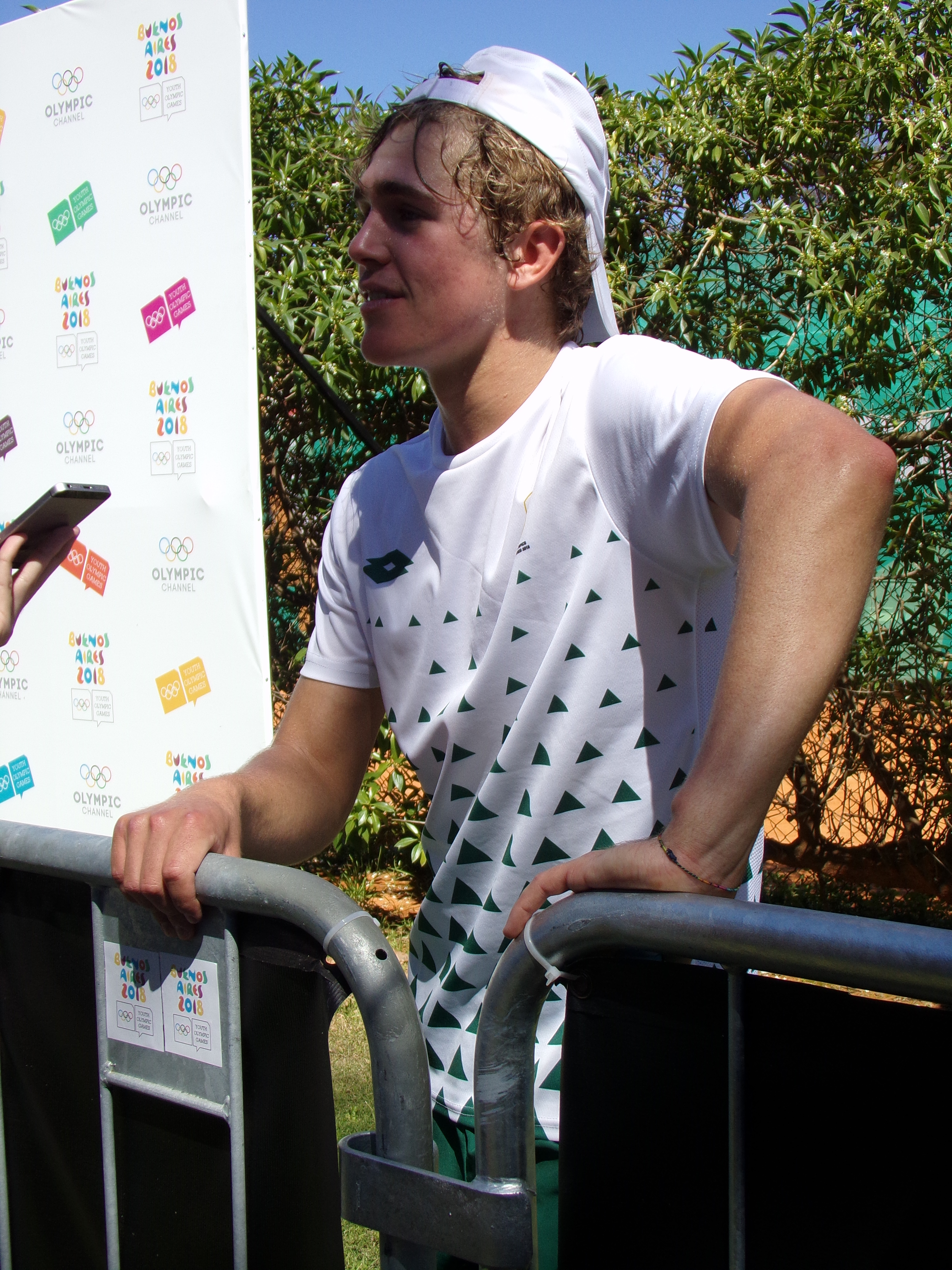 Philip Henning in Buenos Aires 2018 01